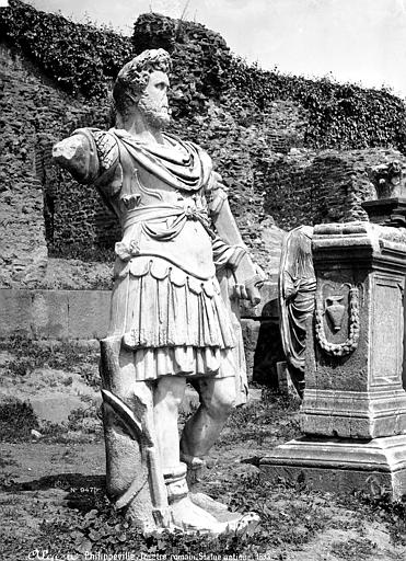 Statue de Skikda (anciennement appelée Philippeville), Algérie